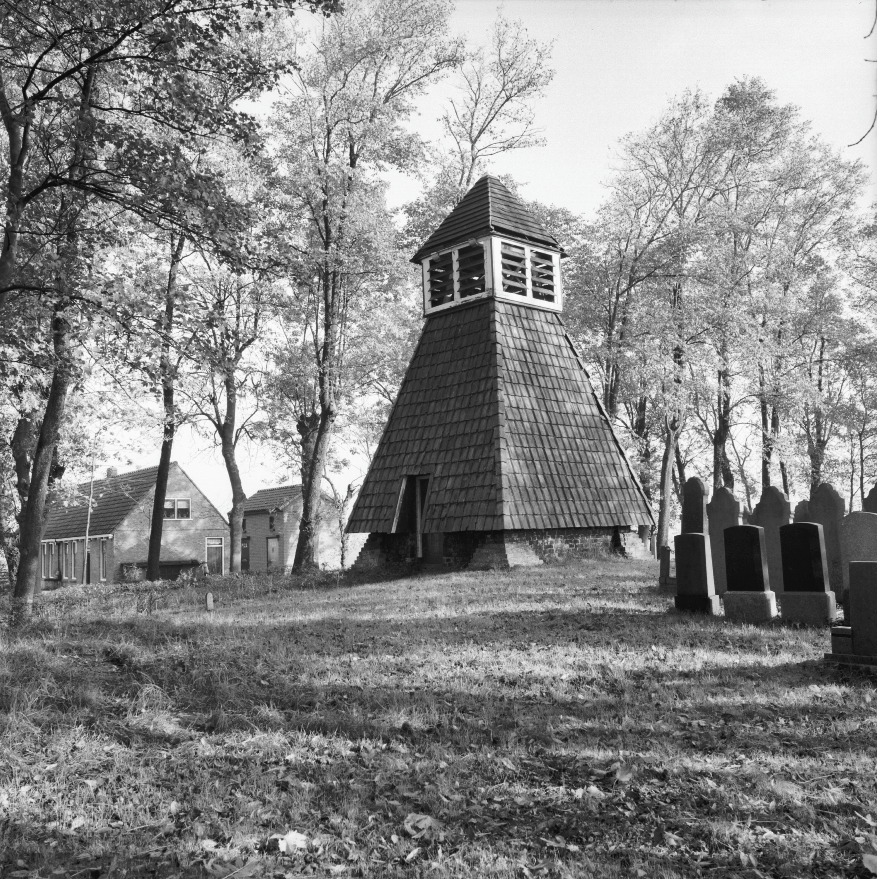 Diversen: klokkestoel